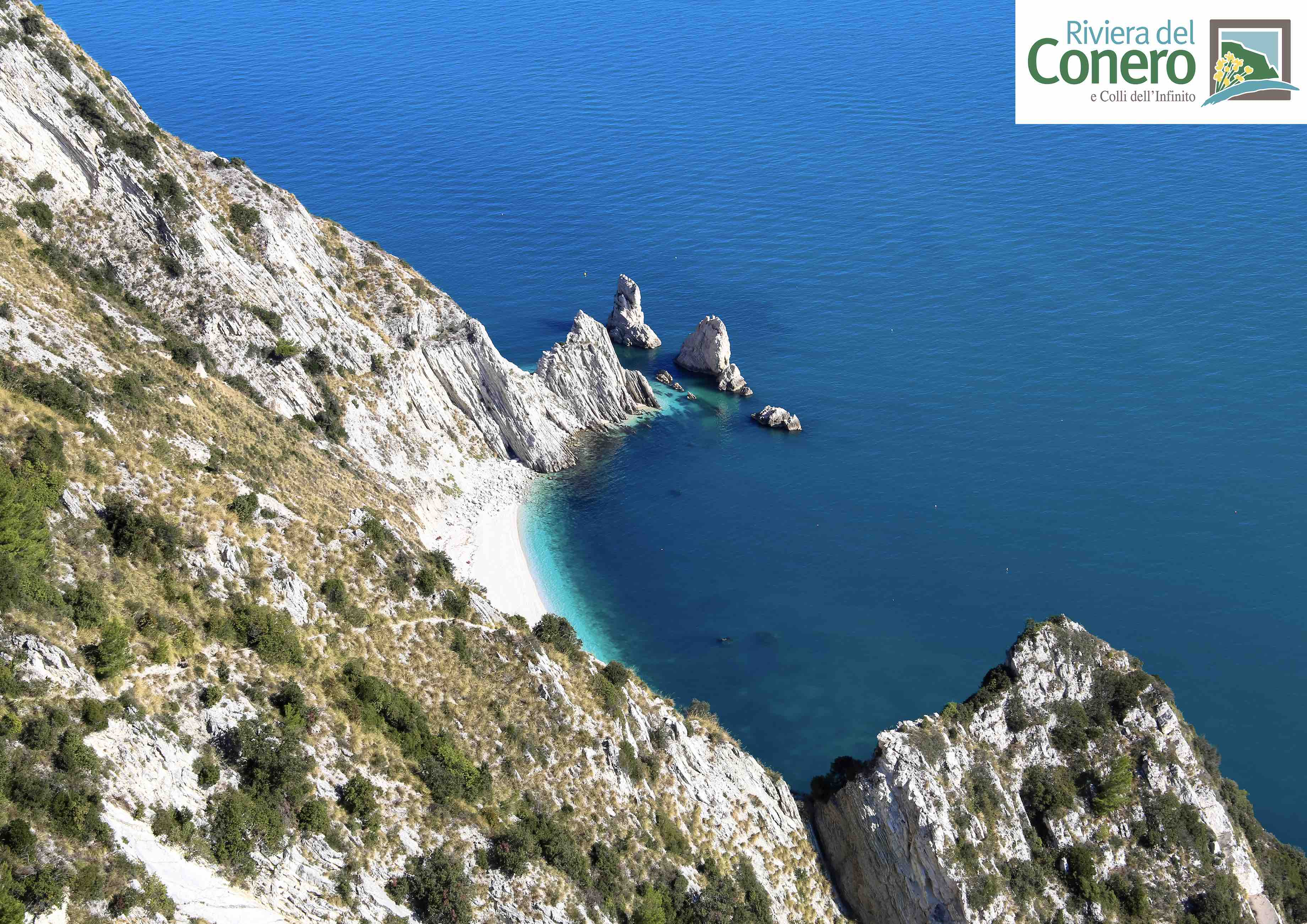 fotografate dal Belvedere del Passo del Lupo, Parco del Conero